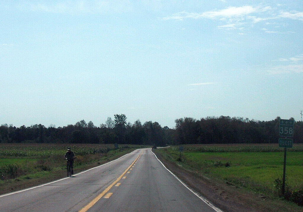 Vue sur un tronçon rural de la route 358, près de Pont-Rouge, Québec, Canada.